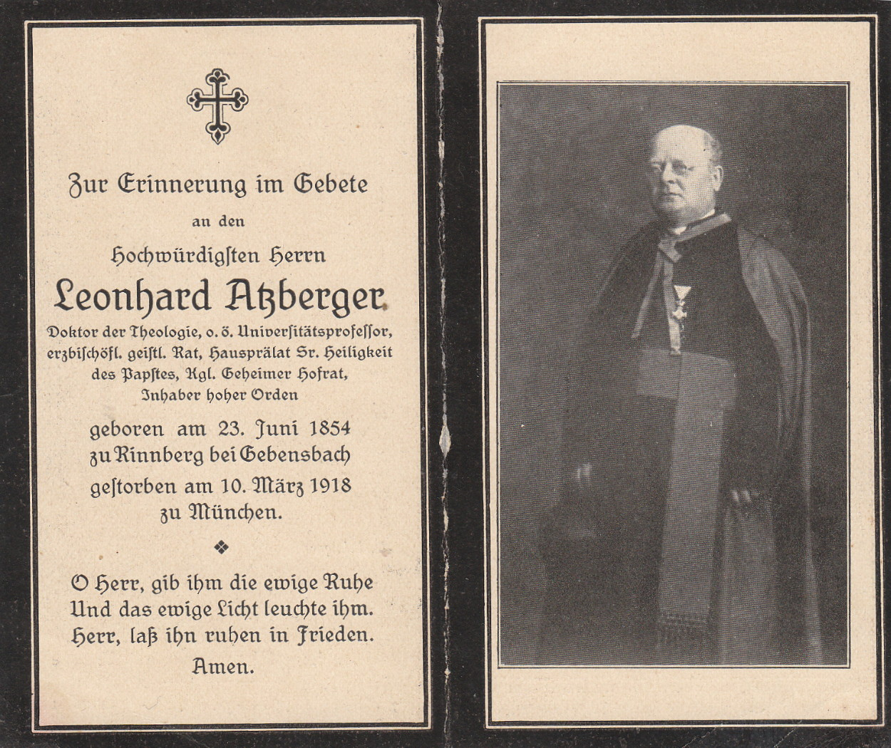 Atzberger Leohard prelate to the Pope, secret Councilor, university professor